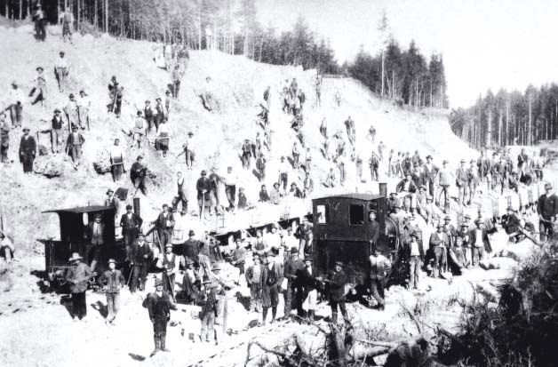 Bauarbeiten zum Durchstich der Meilinger Höhe im Zuge der Errichtung der Lokalbahn Pasing–Herrsching